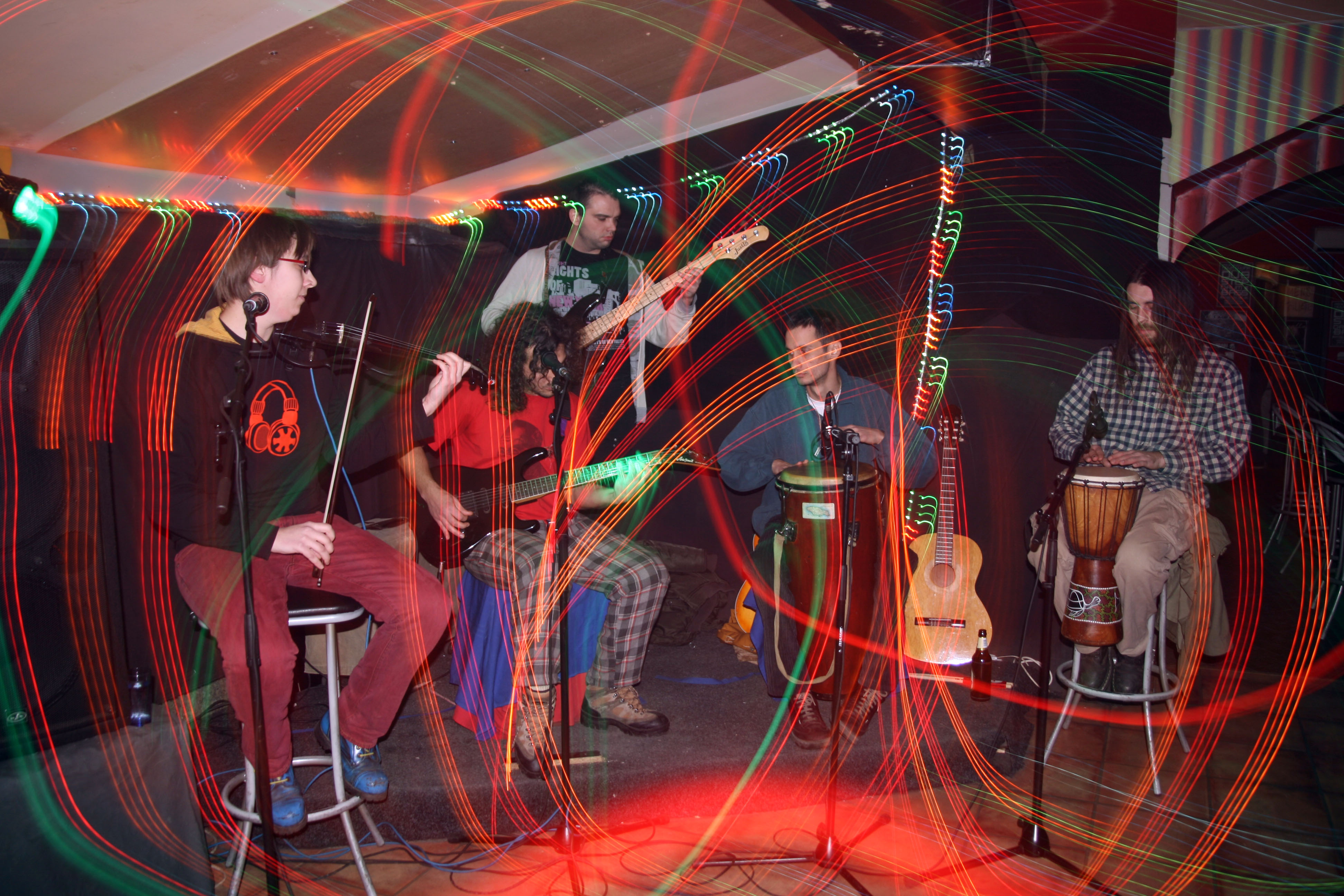 Srpskohrvatski / српскохрватски: Nastup muzičkog projekta Damjan od Resnika u beogradskom klubu Žica 2010.